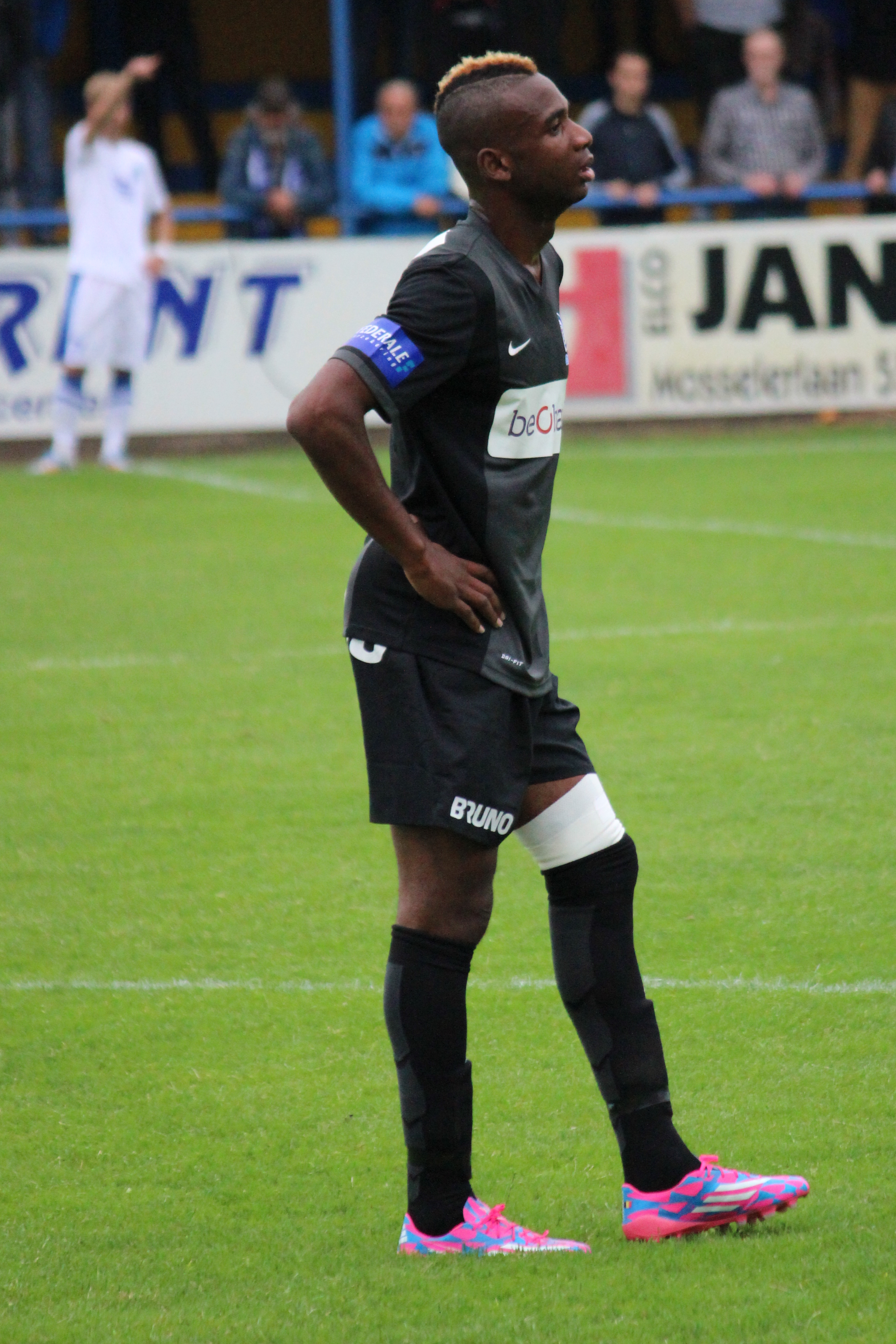 lombe Mboyo